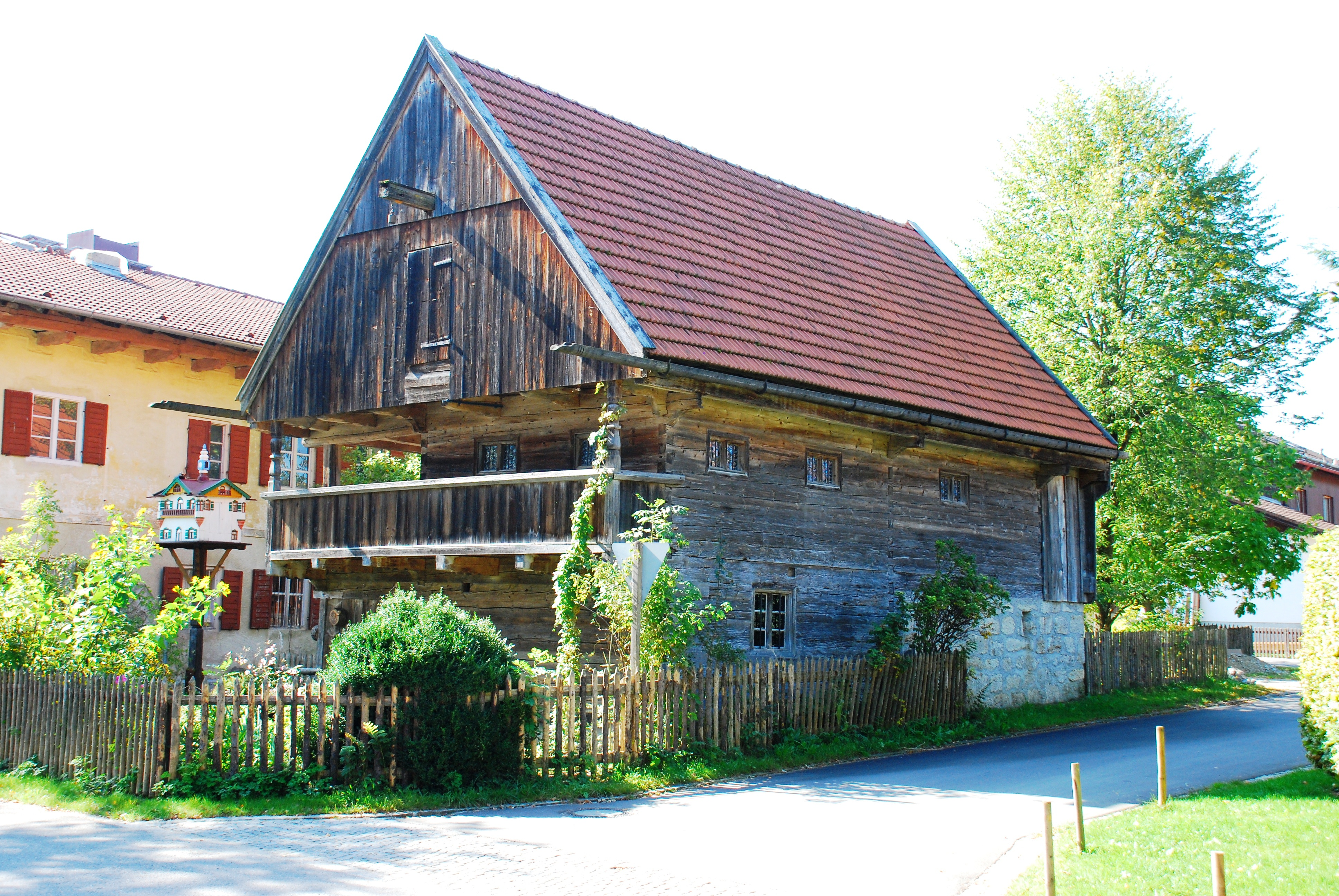 Ehemaliger Troadkasten beim Heimatmuseum der Gemeinde Sauerlach und in der Holzkirchener Straße 22 in Arget, Ortsteil von Sauerlach, Landkreis München, Regierungsbezirk Oberbayern, Bayern. Als Baudenkmal in der Bayerischen Denkmalliste aufgeführt. Foto gemäß den Vorgaben zur Panoramafreiheit von öffentlichem Verkehrsgrund aus aufgenommen.